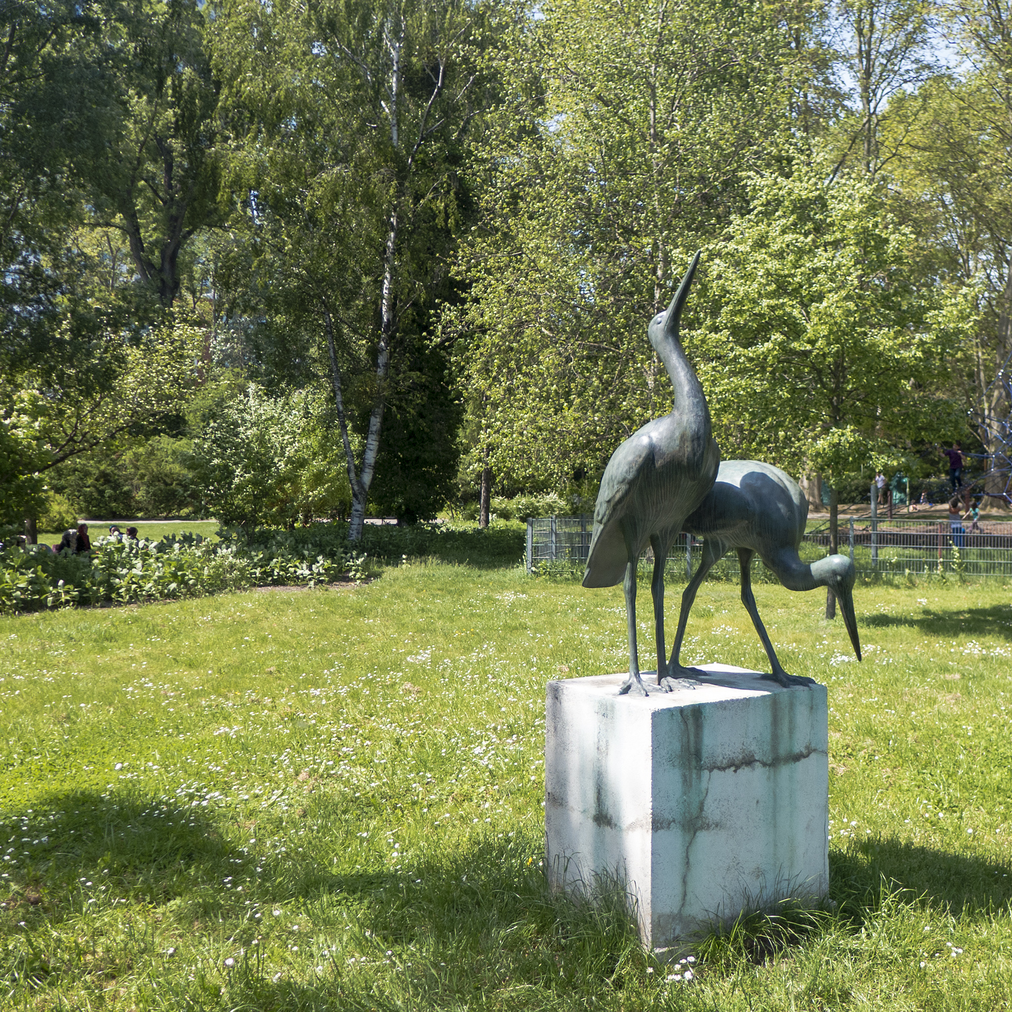 Floridsdorfer Wasserpark in Wien 21